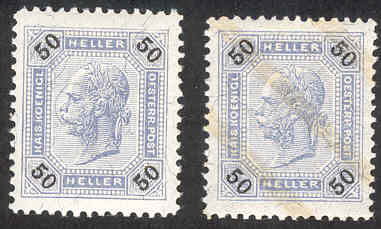 Lackstreifen 1901 Quelle: selbst erstellt